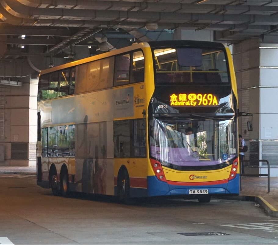 中文（香港）: 過海隧道巴士969A線，正在天水圍市中心上客